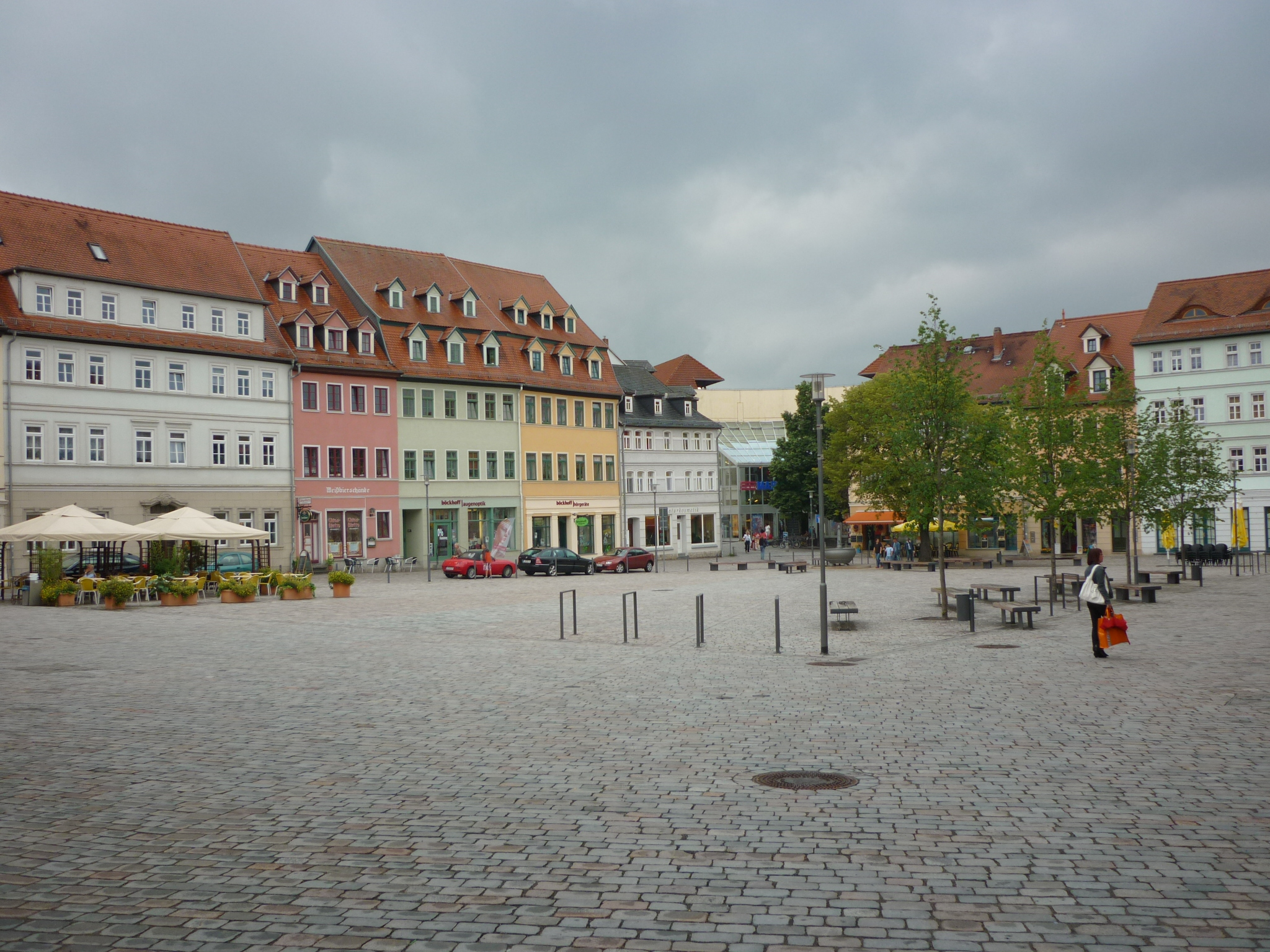 Neu gestalteter Marktplatz von Apolda